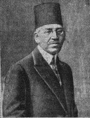 Photographie de Wacyf Boutros-Ghali parue dans le Petit Journal du 4 décembre 1939